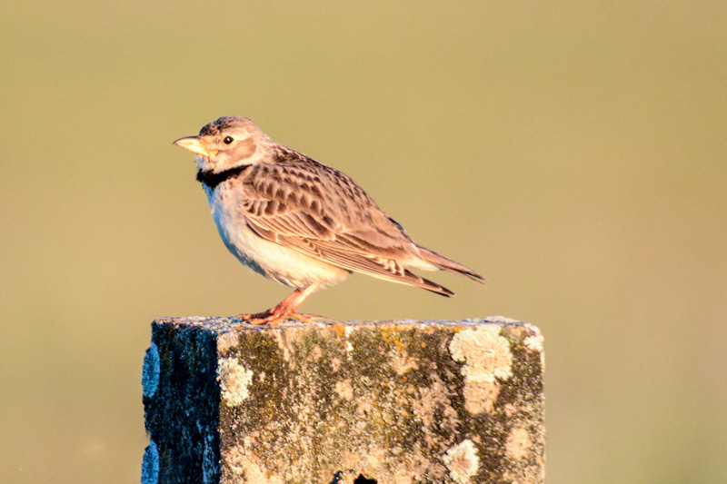 kalanderleeuwerik-2.jpg